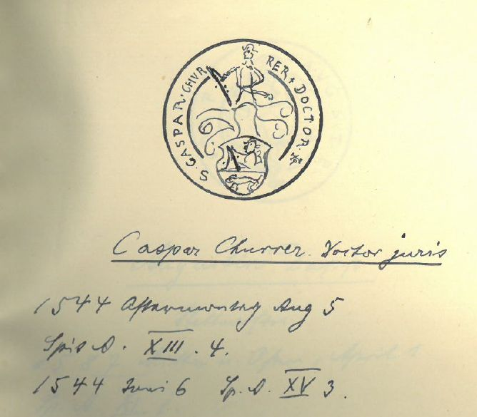 Siegel des Dr. jur. Caspar Churrer 1544. Zeichnung von Rudolf Weser